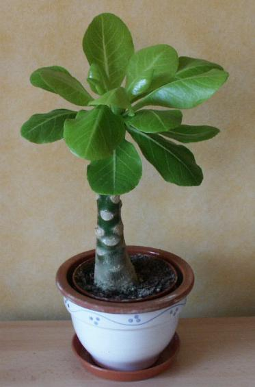 Quelle: selbst fotografiert, 10/2004 Fotograf: Späth Christian Lizenzstatus